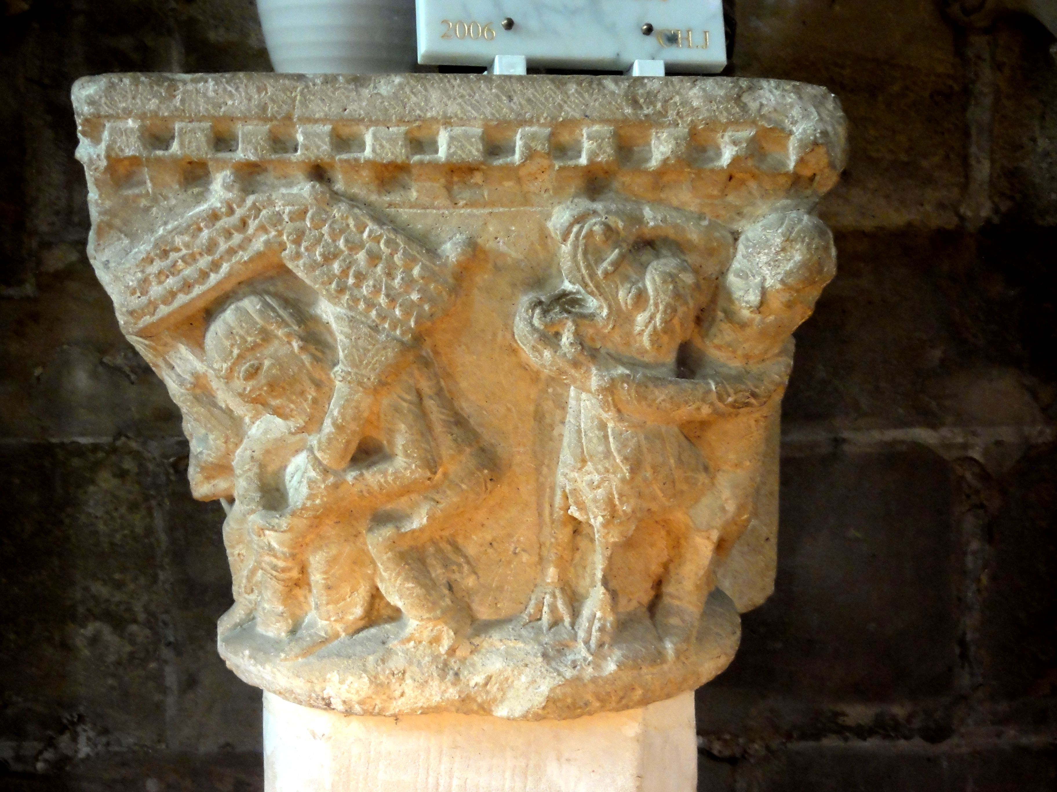 Chapiteau roman déposé, retrouvé en 1960.